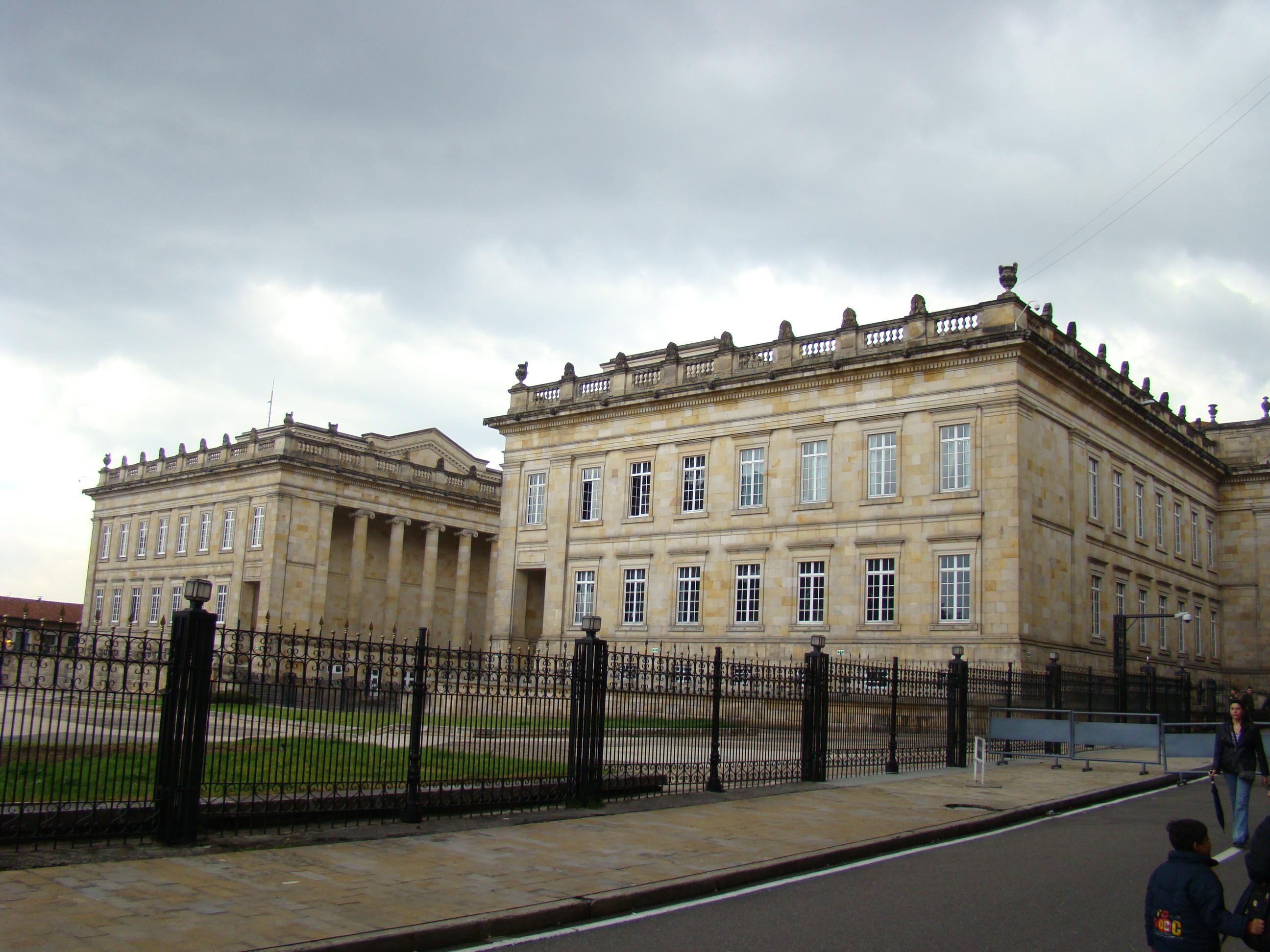 Palacio de Nariño